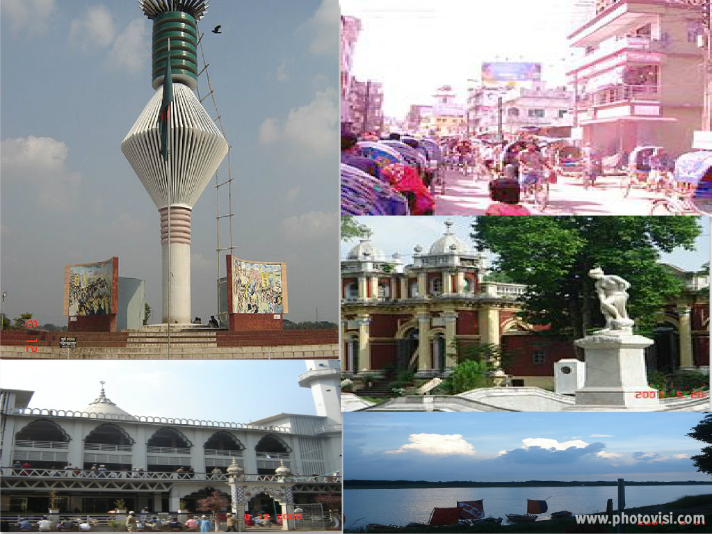 ঘড়ির কাঁটা অনুযায়ী ময়মনসিংহের মক্তিযুদ্ধের স্মিতিসৌধ;গাঙিনাপাড়; মহিলা টিচার্স ট্রেনিং কলেজ; ব্রহ্মপুত্র নদের দৃশ্য; বড় মসজিদ।